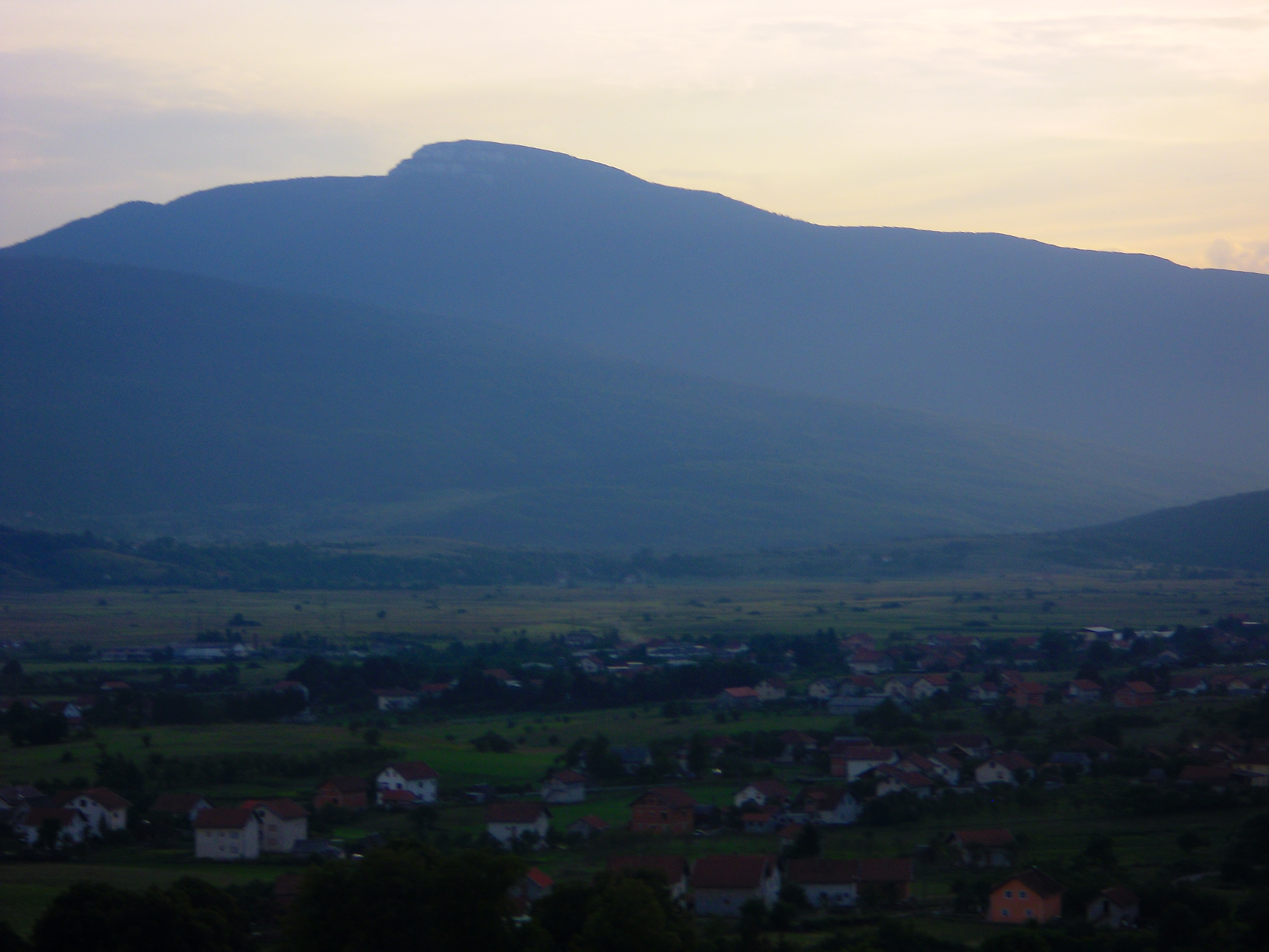 Pogled na Osječenicu iz Petrovca